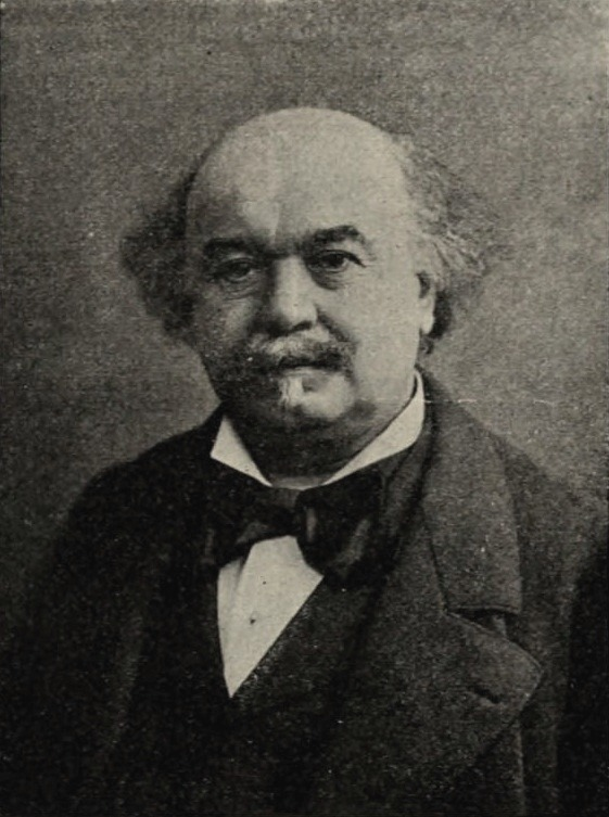 "Tony Révillon - Cliché Nadar".